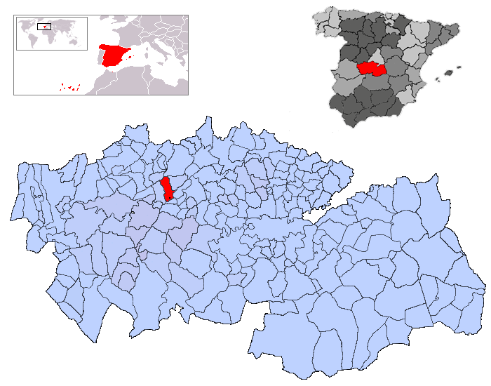 Los Cerralbos en la provincia de Toledo